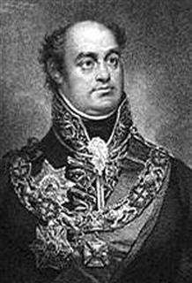 William Carr Beresford (2 de octubre de 1768 - 8 de enero de 1854) soldado y político británico. Fue general británico y mariscal en el ejército portugués, luchó con el duque de Wellington en la guerra peninsular.